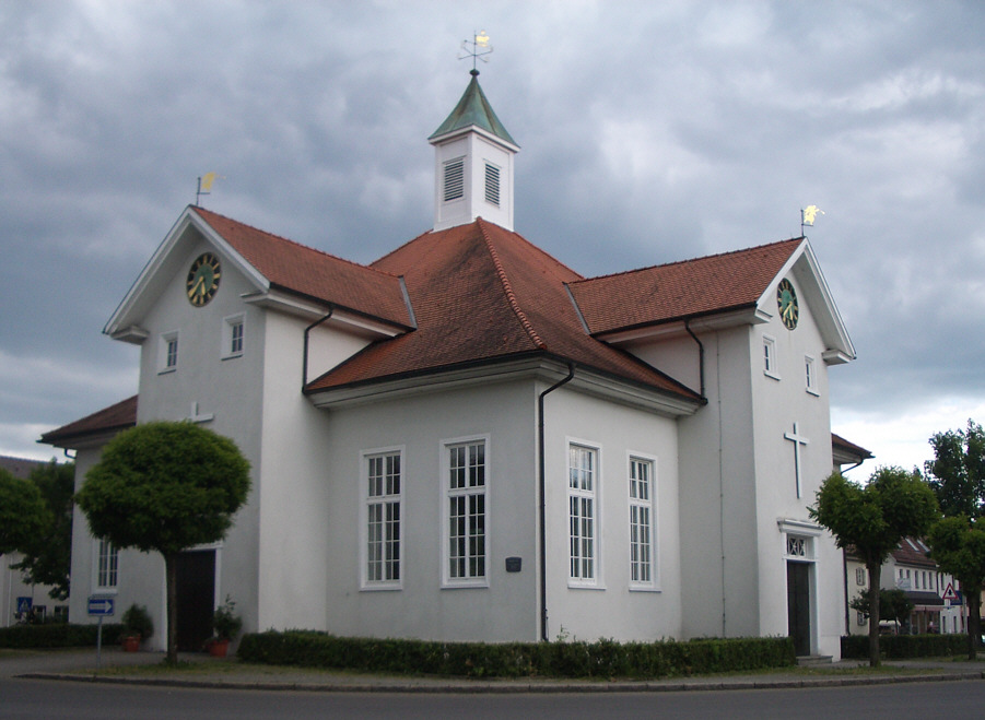 Wilhelmsdorf (Württemberg), Germany: Betsaal